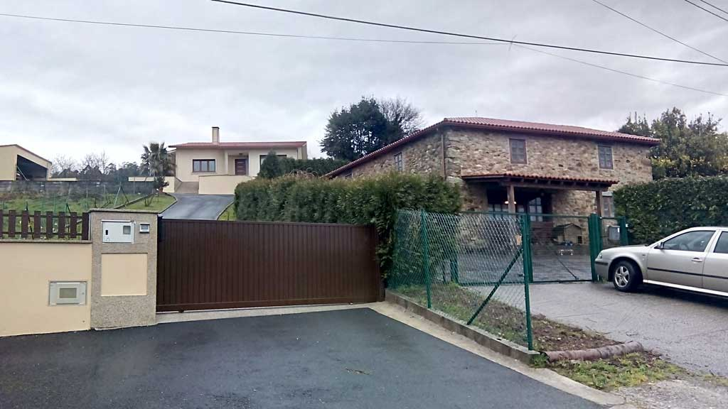 Vista do Mosteiro, Pedroso, Narón.